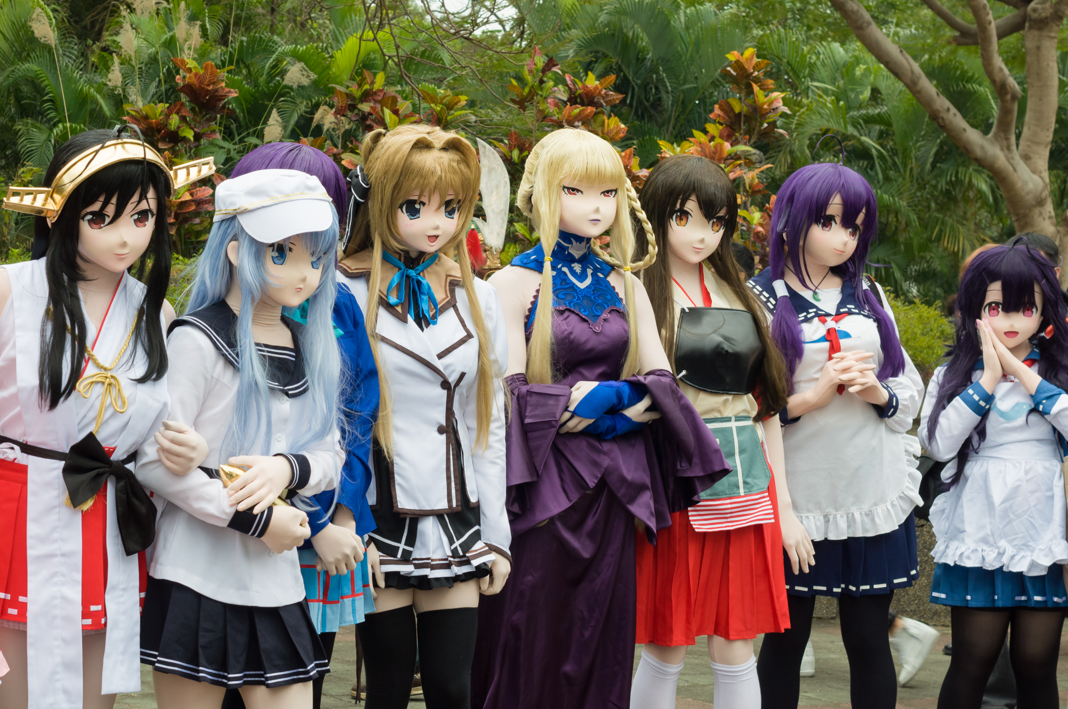 第29屆開拓動漫祭，布偶裝《艦隊Collection》cosplayer群。